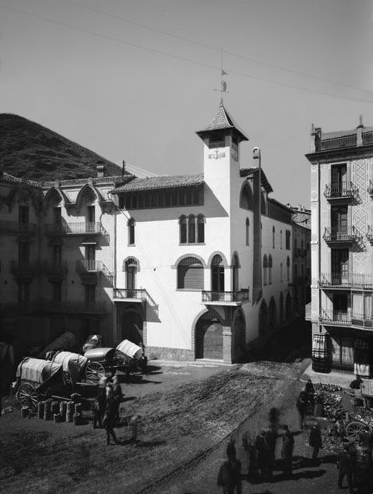 Imatge